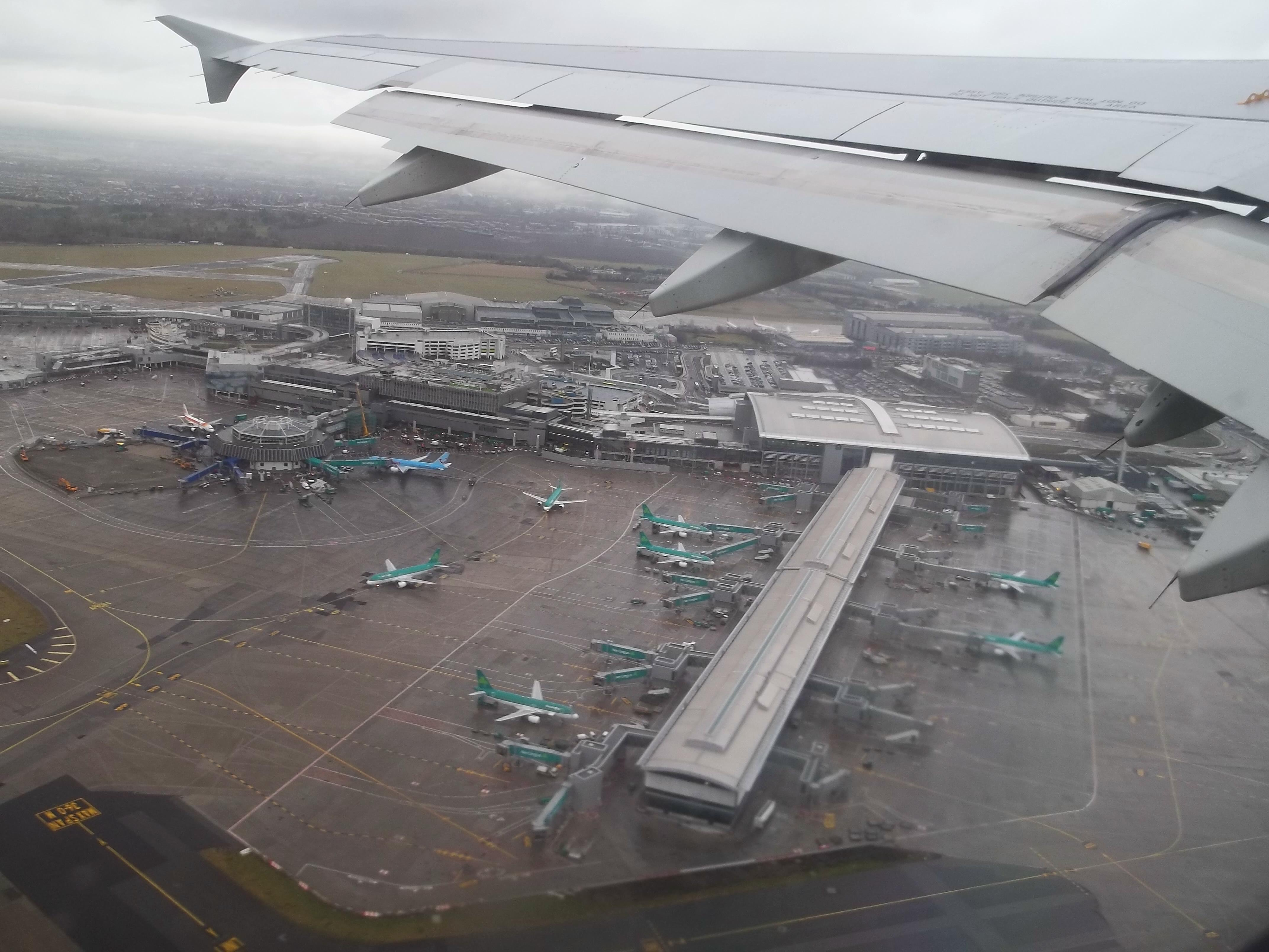 טרמינל ,2 נמה"ת דבלין